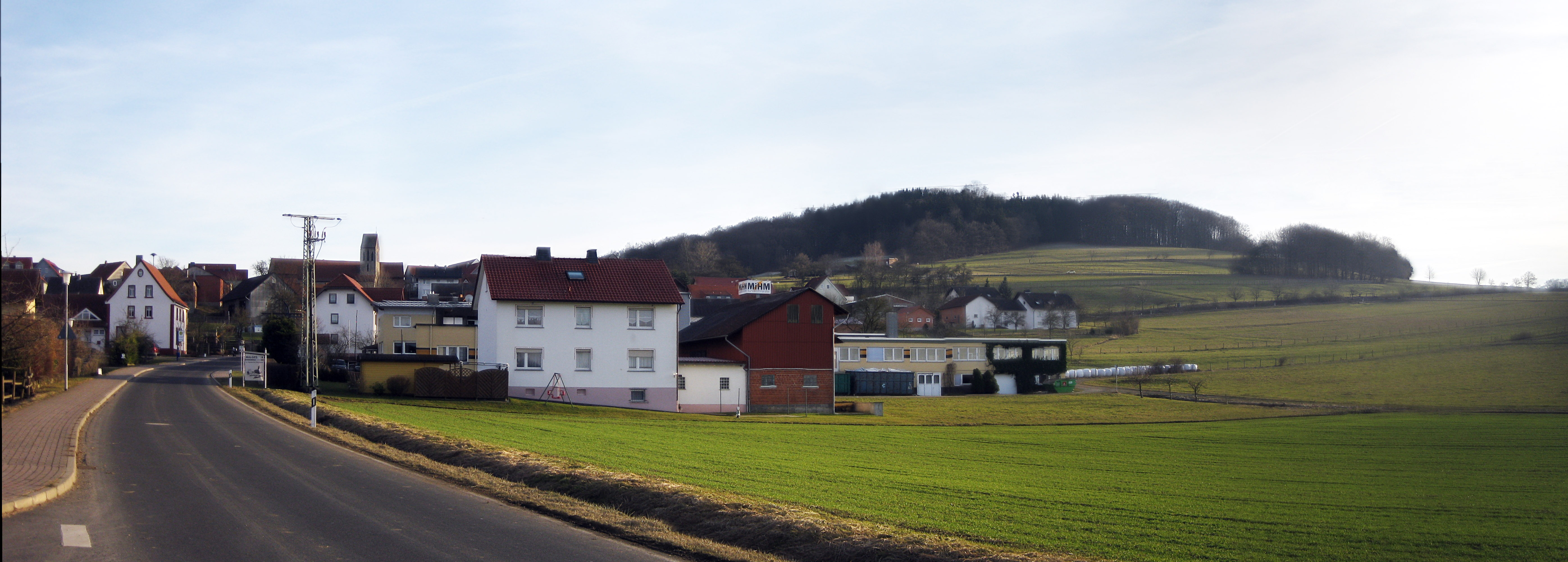 Malges im Vordergrund, hinten: Wieselsberg [Originalbild leicht bearbeitet]